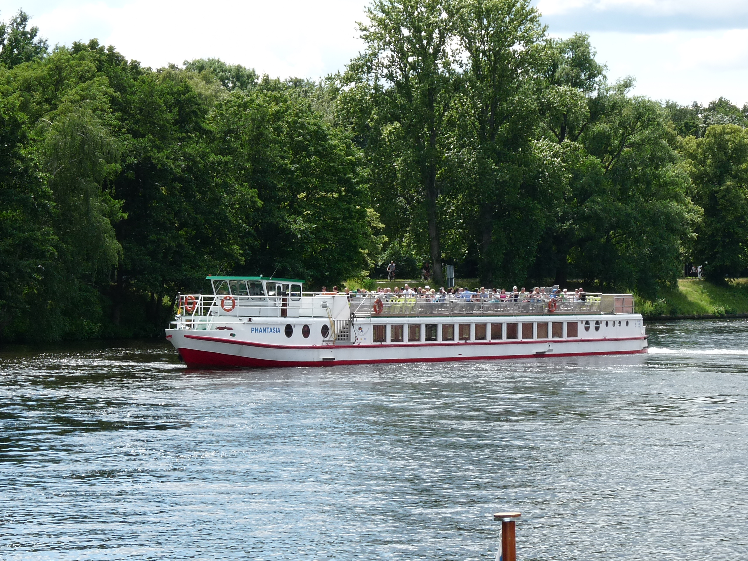 Fahrgastschiff Phantasia in Berlin auf der Spree.